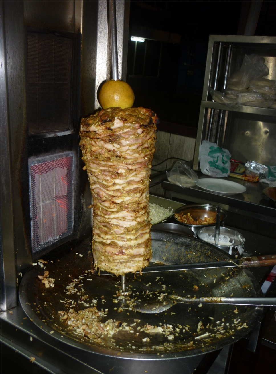 ഷവര്‍മ്മ ഉണ്ടാക്കുന്ന യന്ത്രം